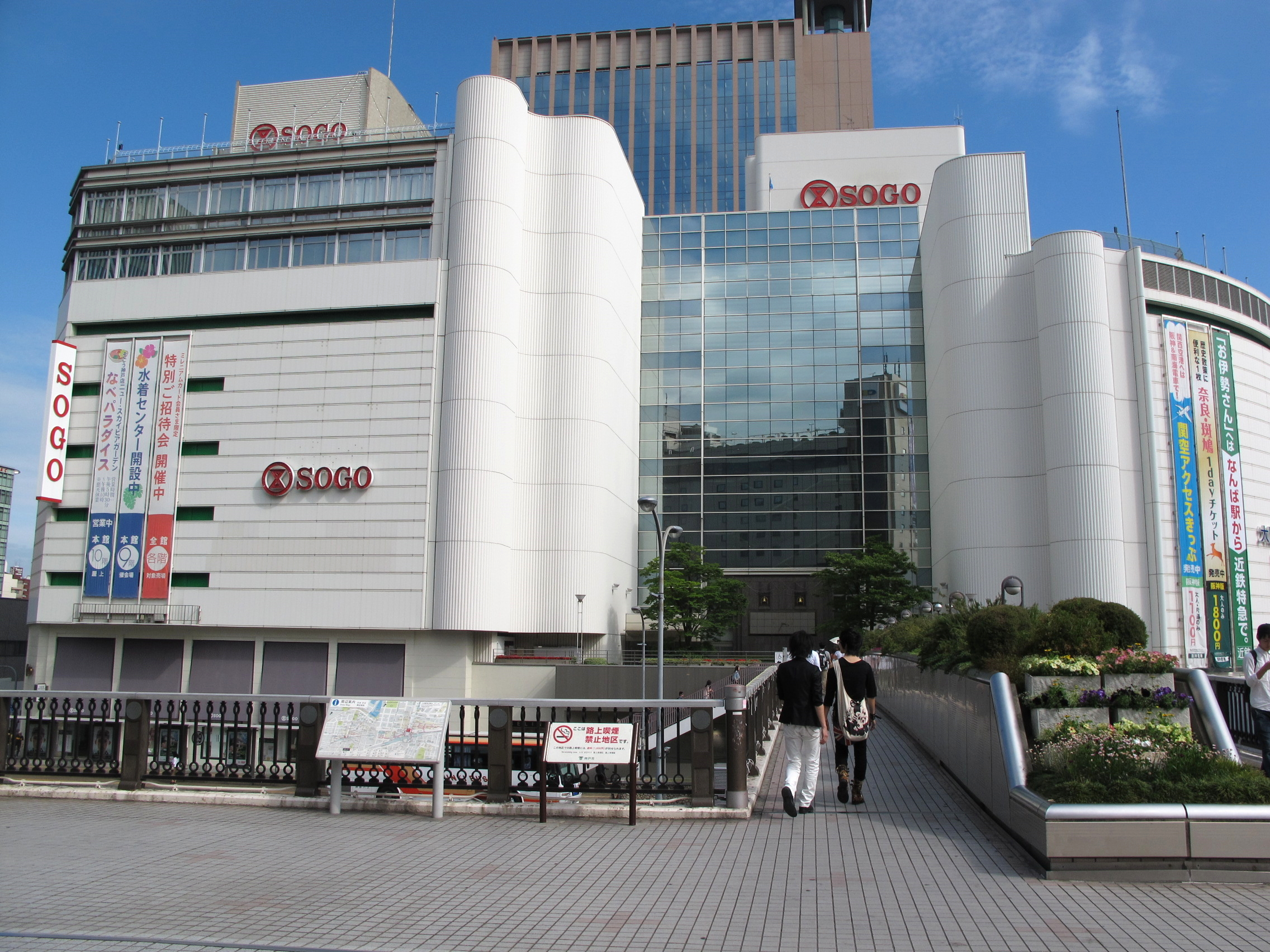 Sogo Kobe